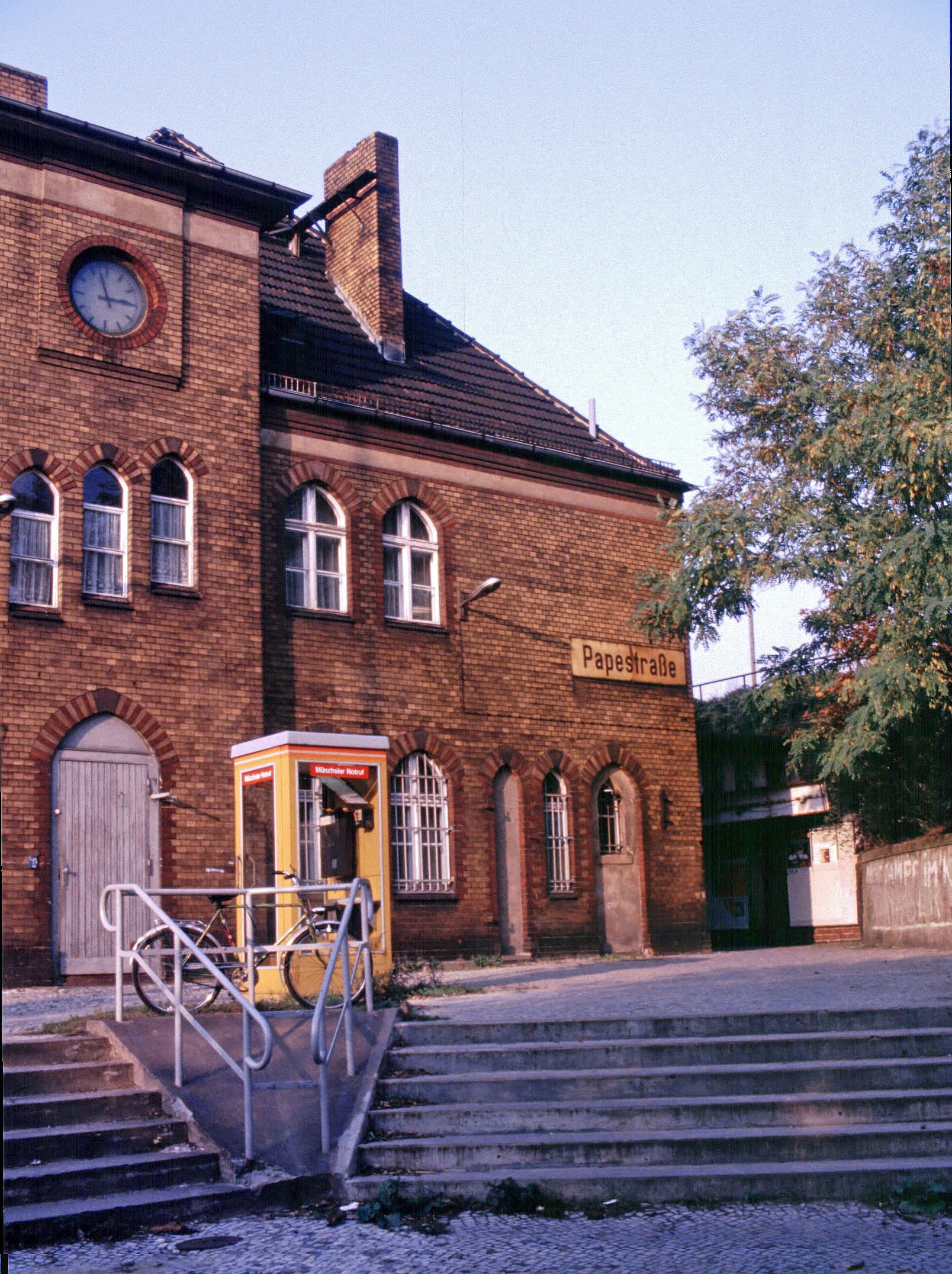 südlicher Zugang Bf. Papestraße Sept 1983